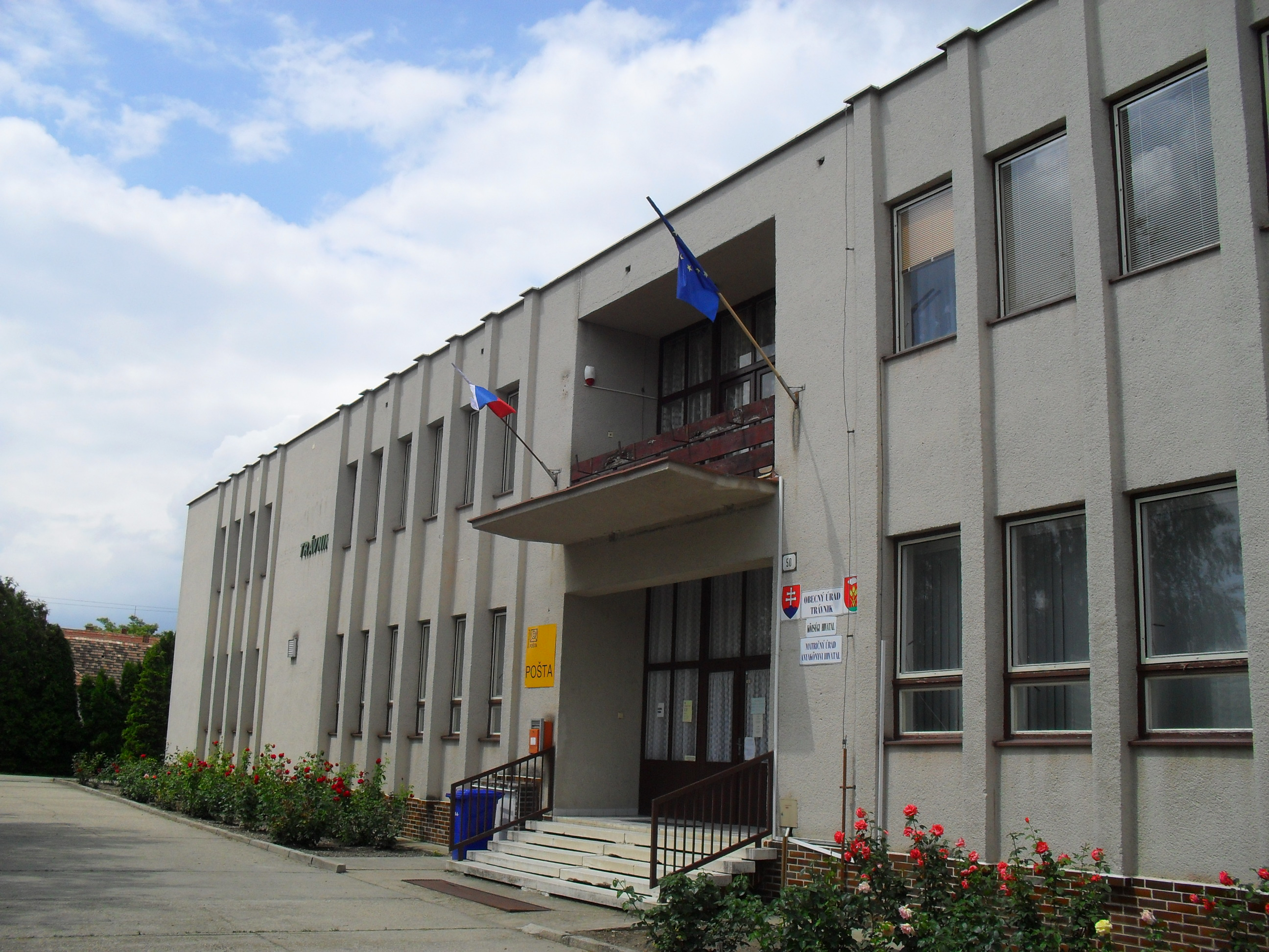 Komáromfüss - községi hivatal